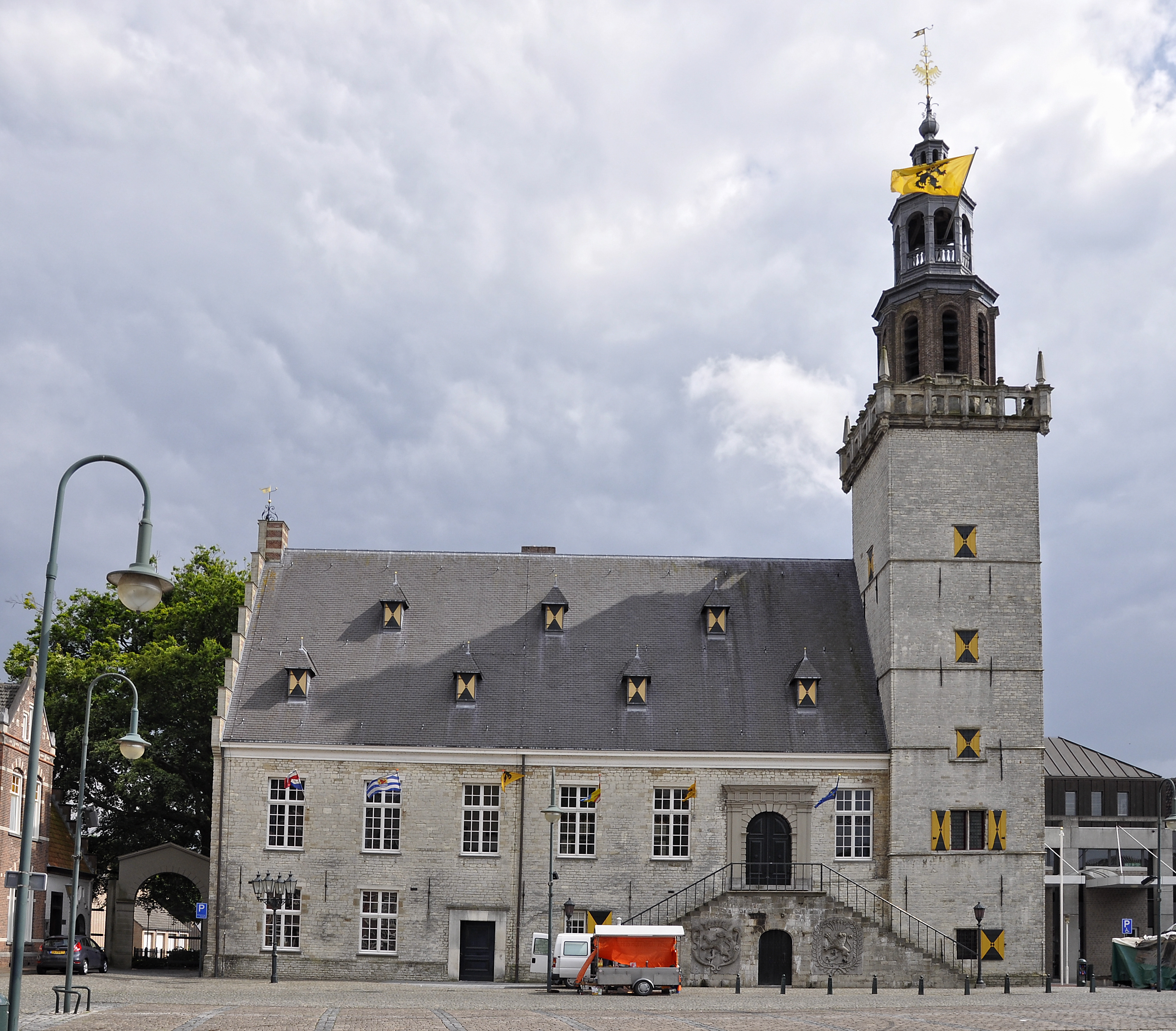 Het stadhuis van Hulst, Nederland